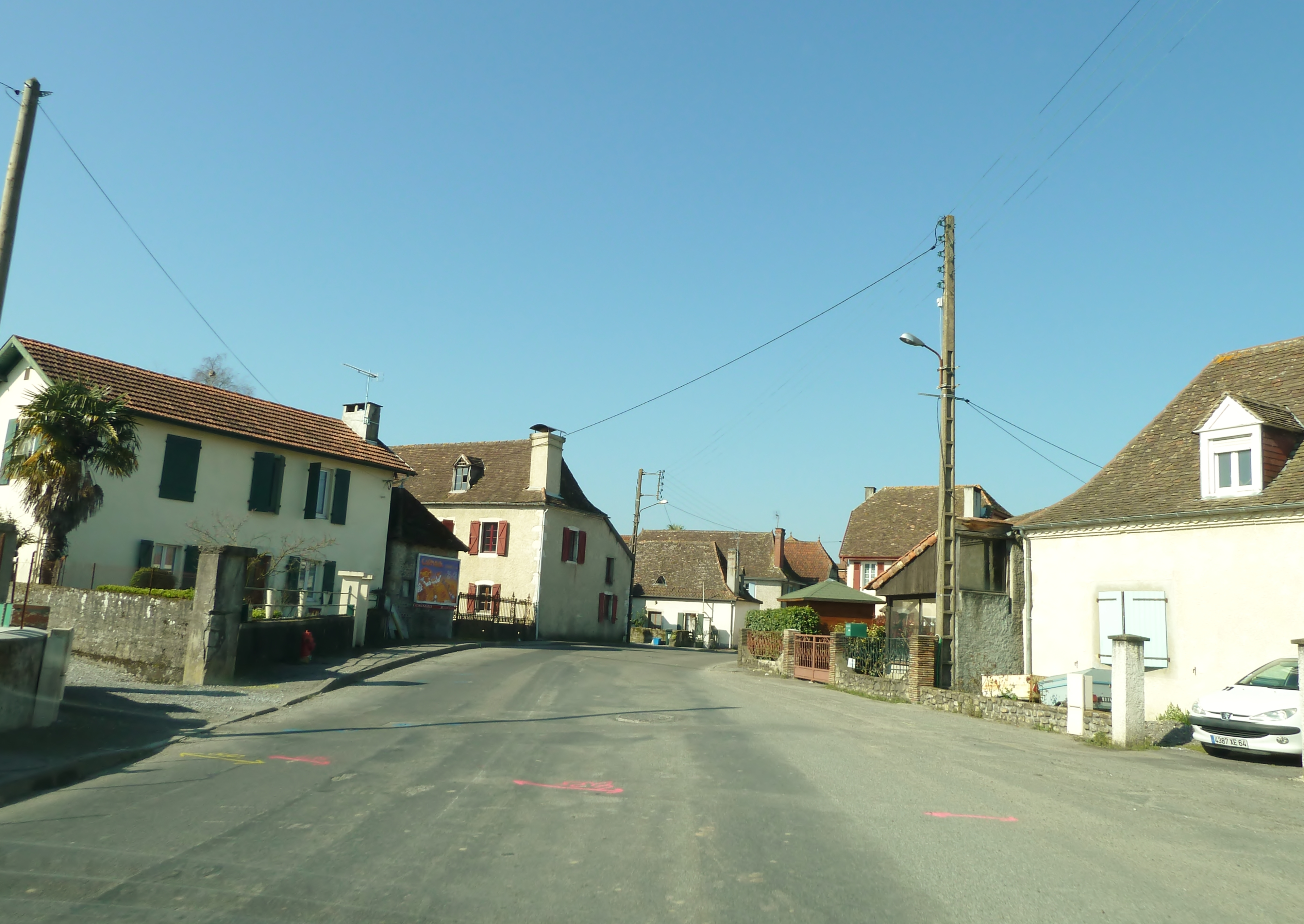 Biron (Pyrénées-Atlantiques)